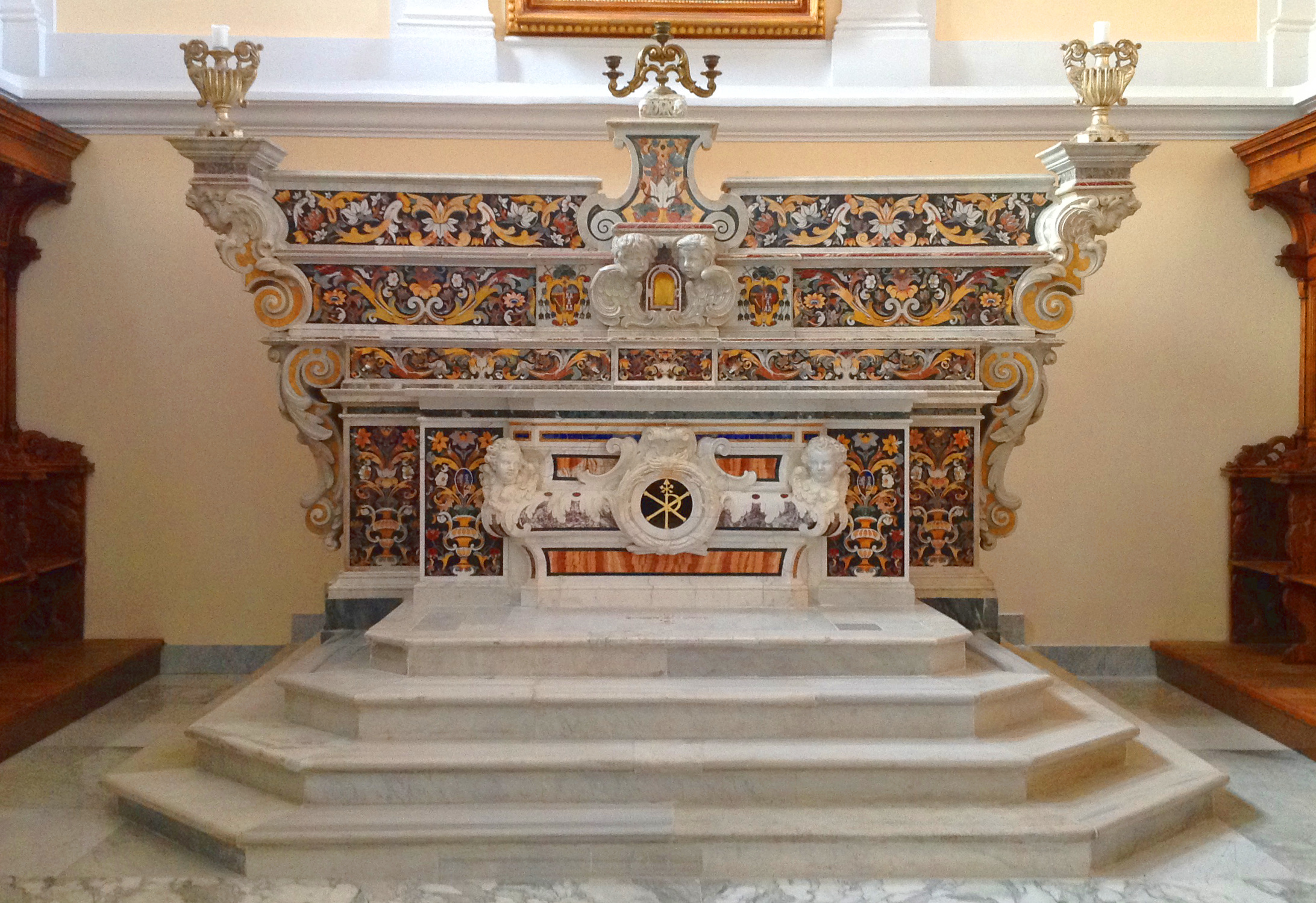 L'altar maggiore pre-conciliare, opera di Dionisio Lazzari, nella Cattedrale di Gaeta.jpg